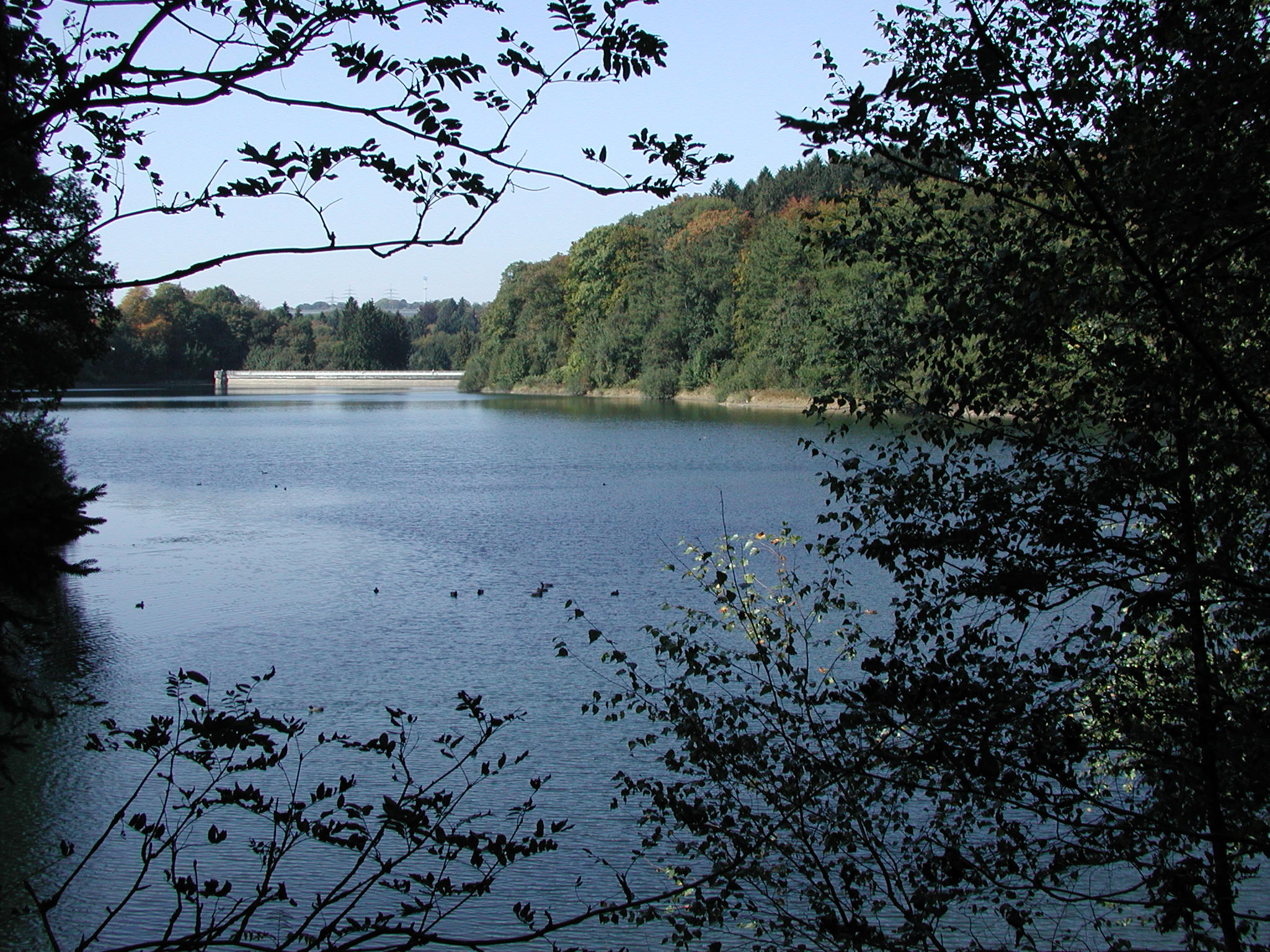 Bild: Eschbachtalsp.JPG